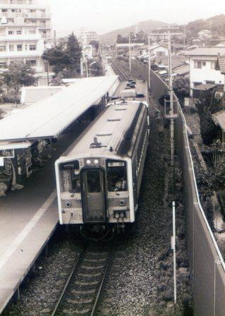 1993年、JR長者原駅篠栗線ホーム